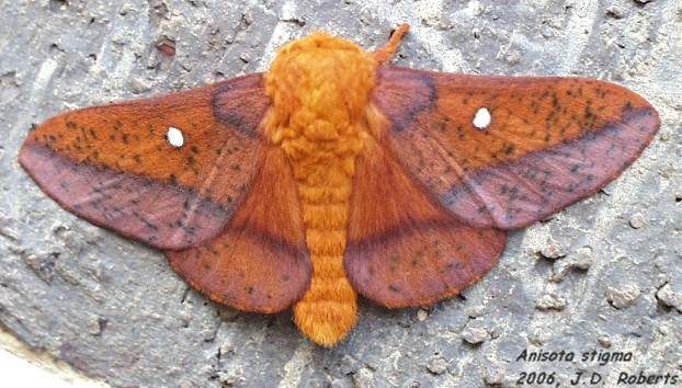 Anisota stigma, adult male